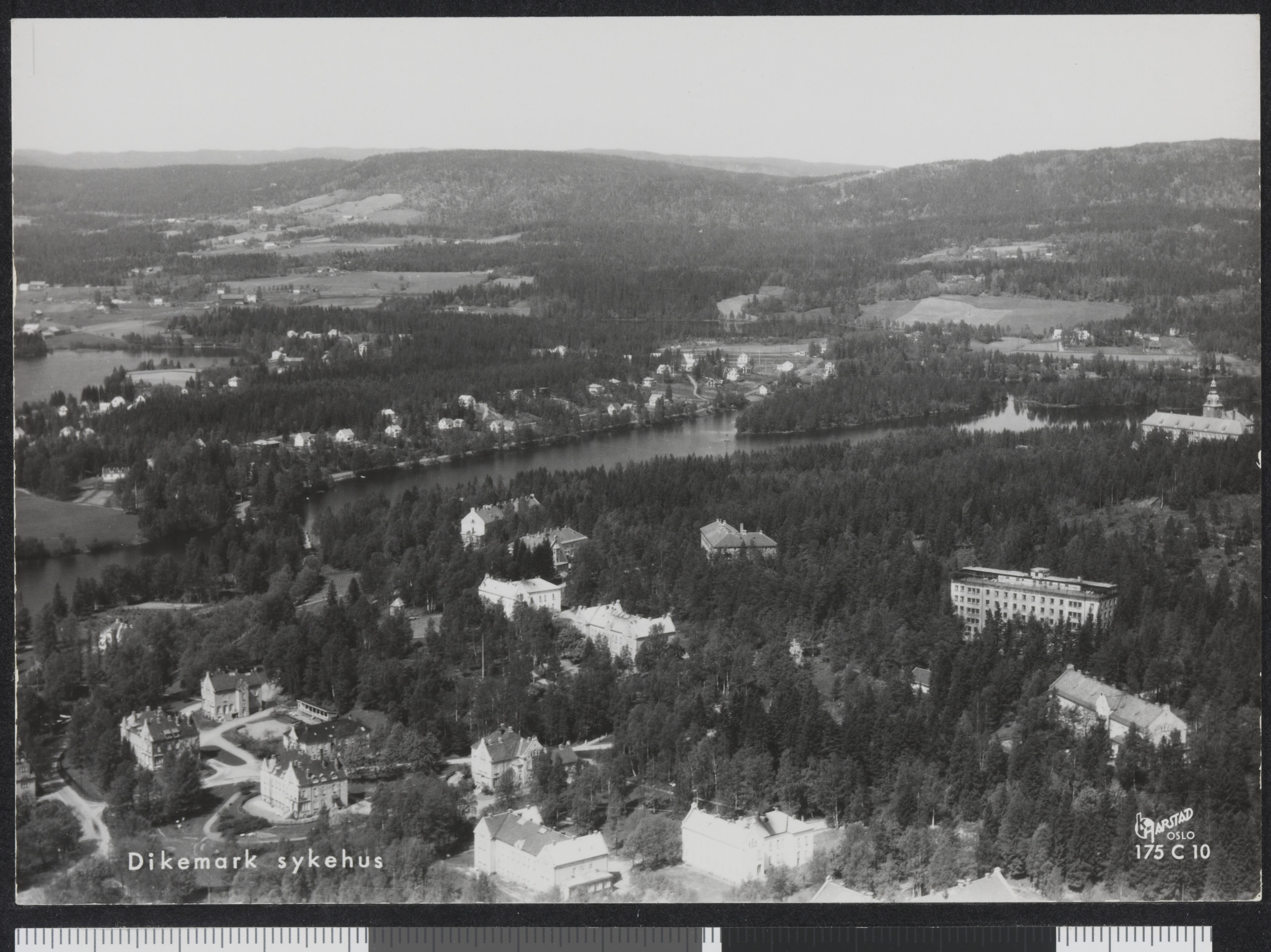 Bildet er hentet fra Nasjonalbibliotekets bildesamling Dikemark, Asker, Akershus